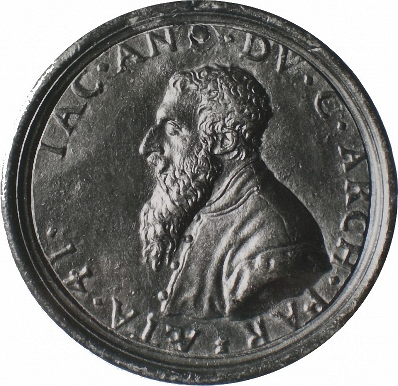 Médaille à l'effigie de Jacques Androuet du Cerceau.